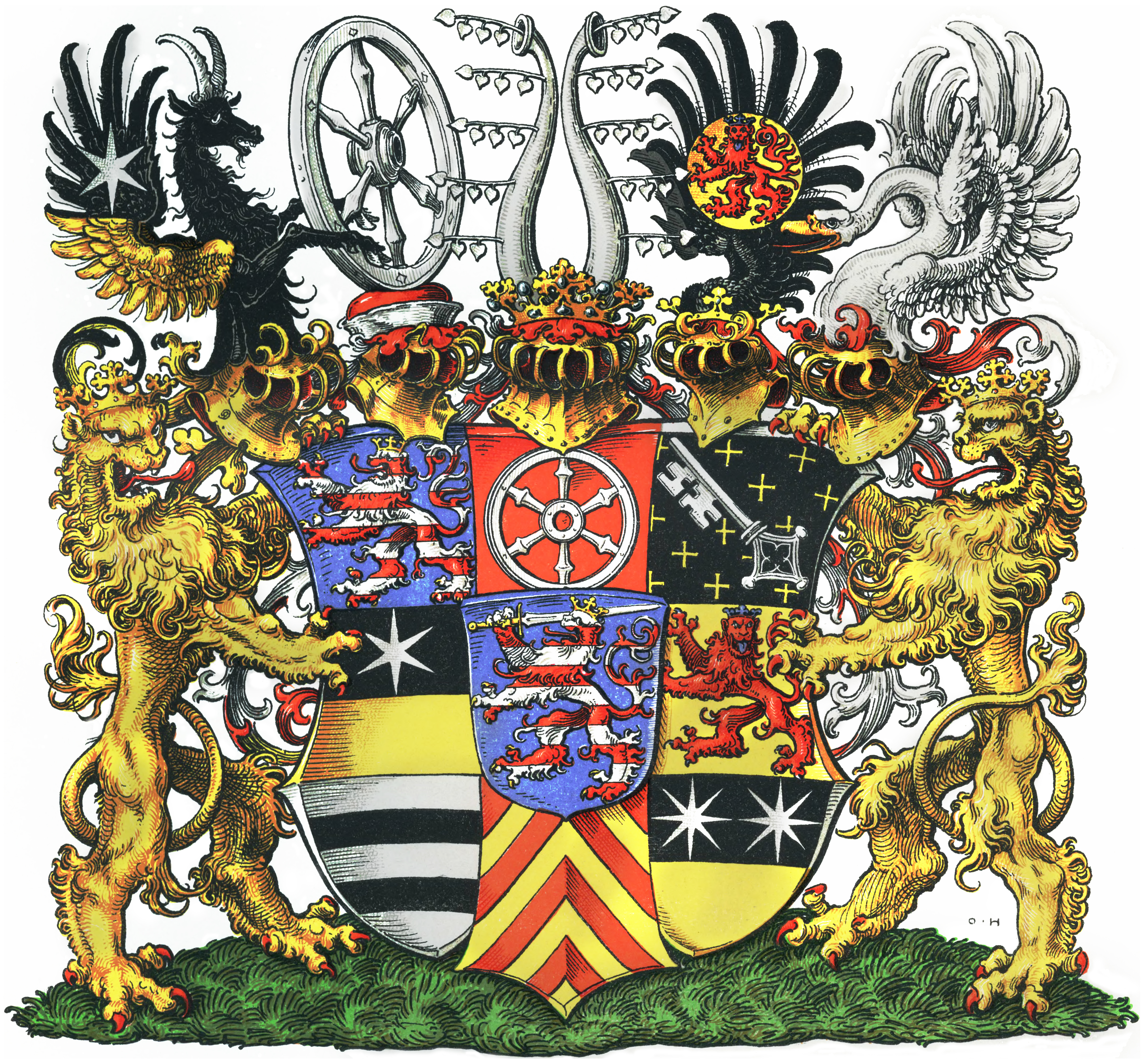 Großherzog von Hessen und bei Rhein seit 9.12.1902. – Großes Staatswappen des Großherzogtums Hessen